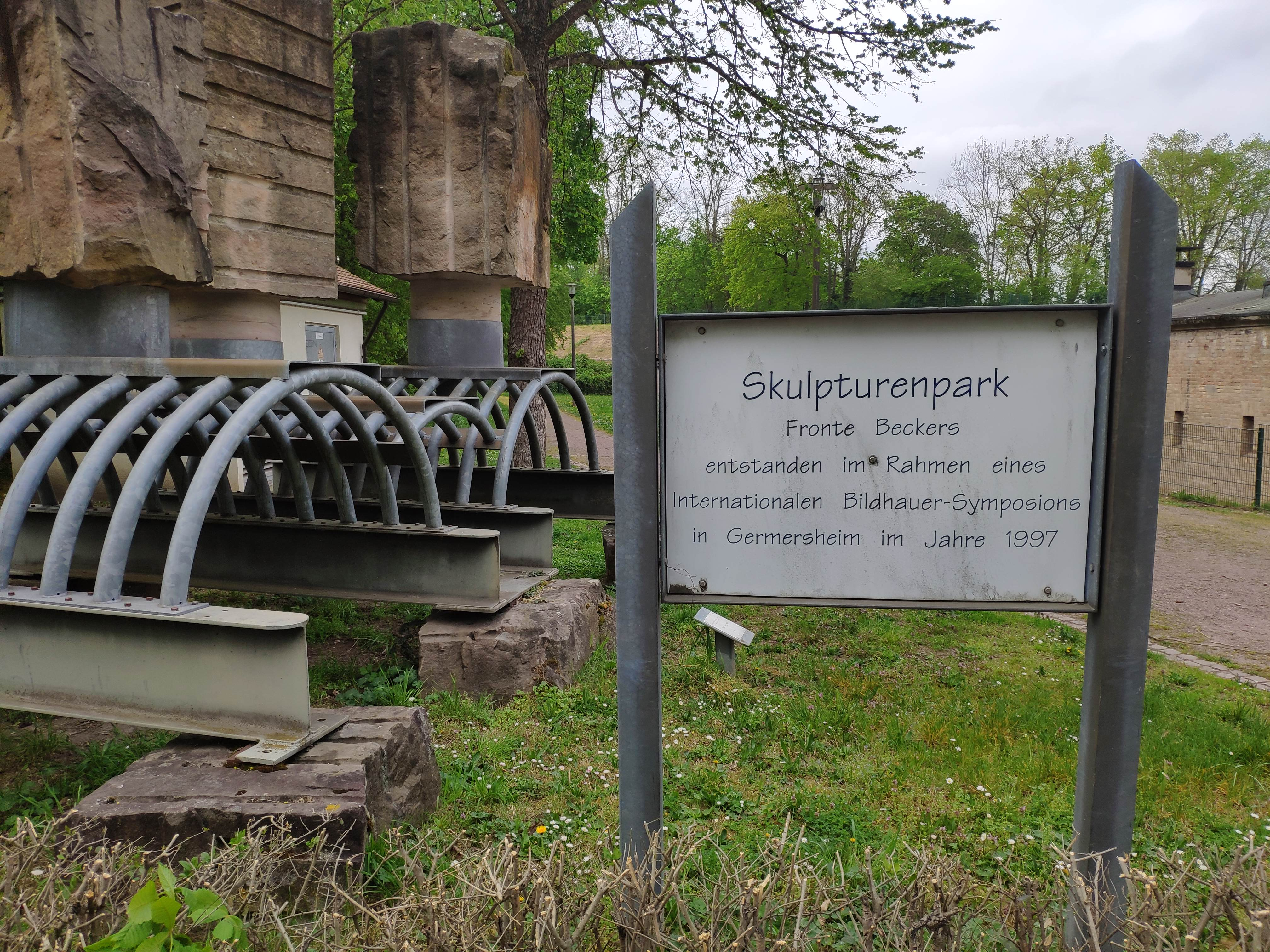 Skulpturenpark Germersheim Eintrittsschild